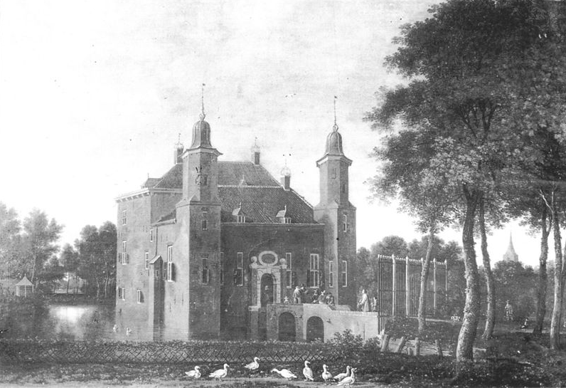 Huis te Linschoten in Linschoten